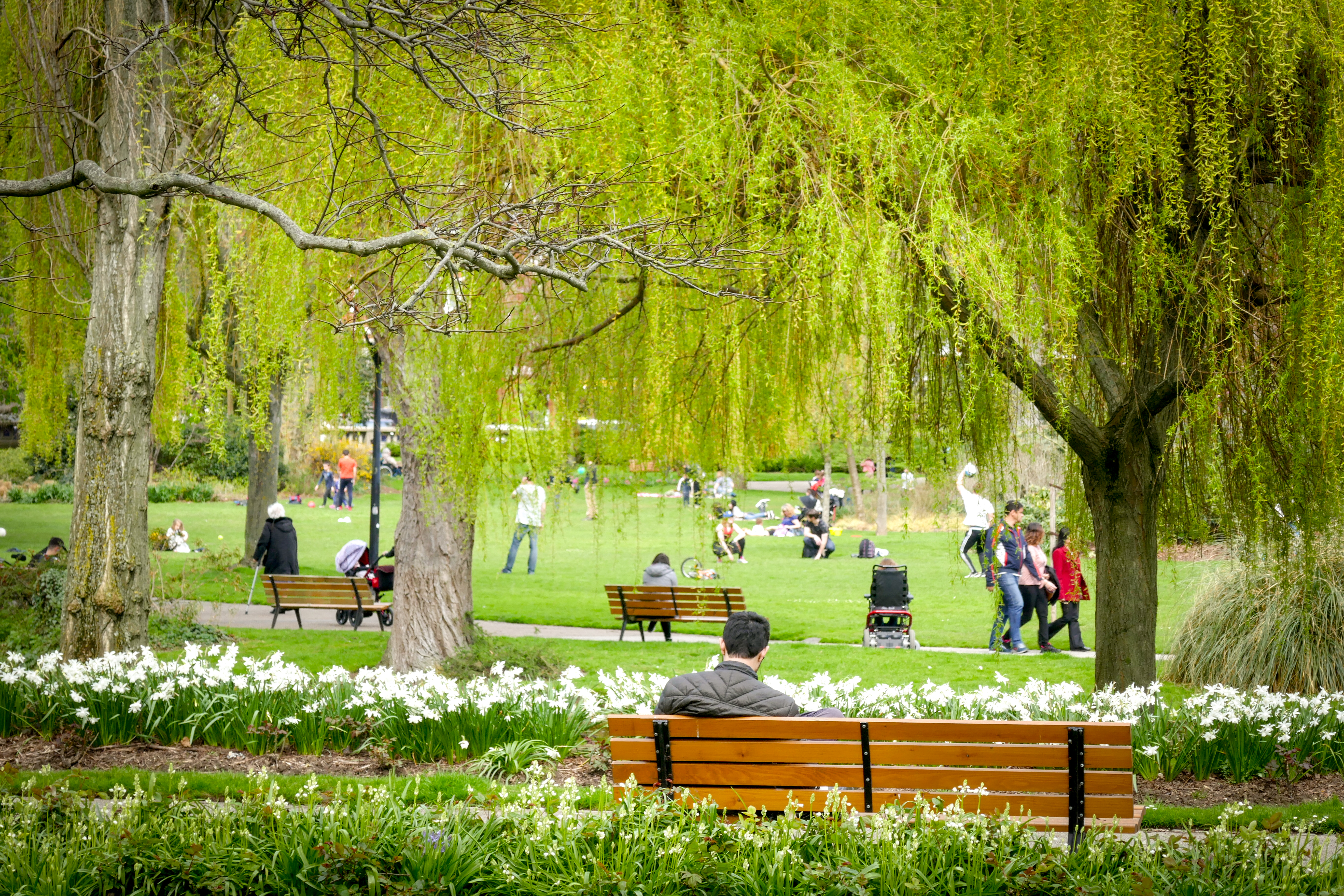 Le square Saint-Roch